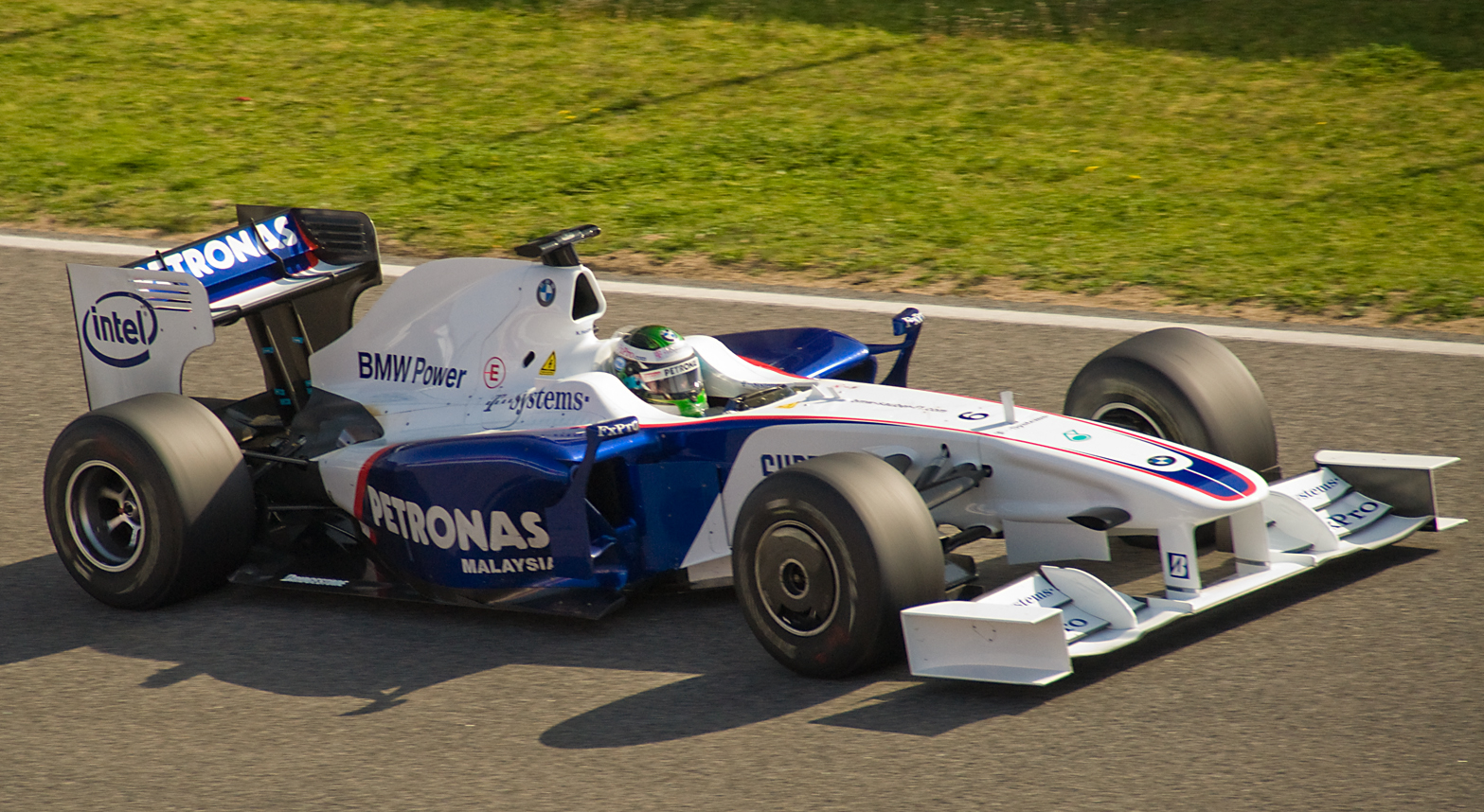 Nikon D90 + Sigma 18-200 DC OS HSM 1/1600s - F/6.3 - 200mm - ISO900